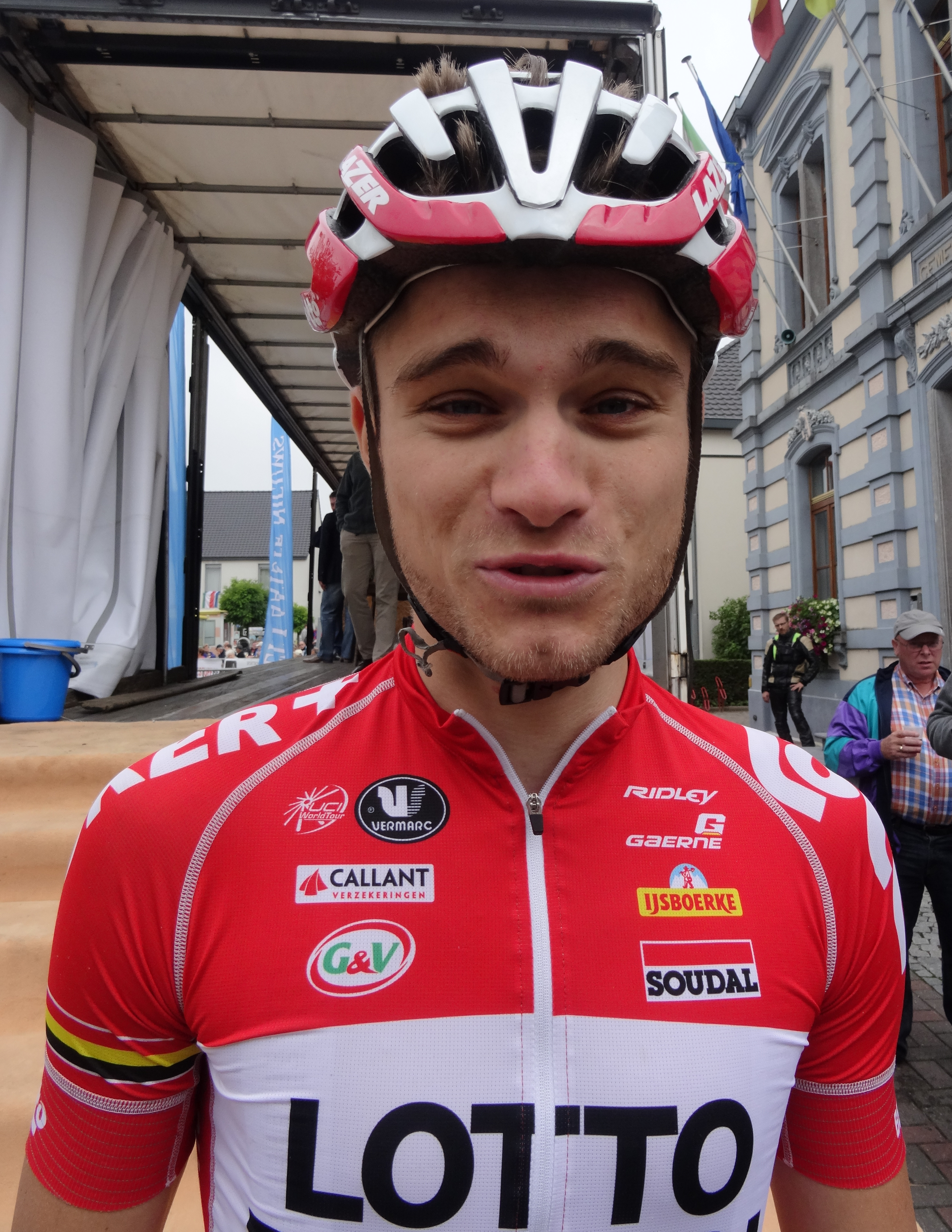 Reportage photographique réalisé le mercredi 27 août à l'occasion du départ de la Druivenkoers Overijse 2014 à Huldenberg, Belgique.